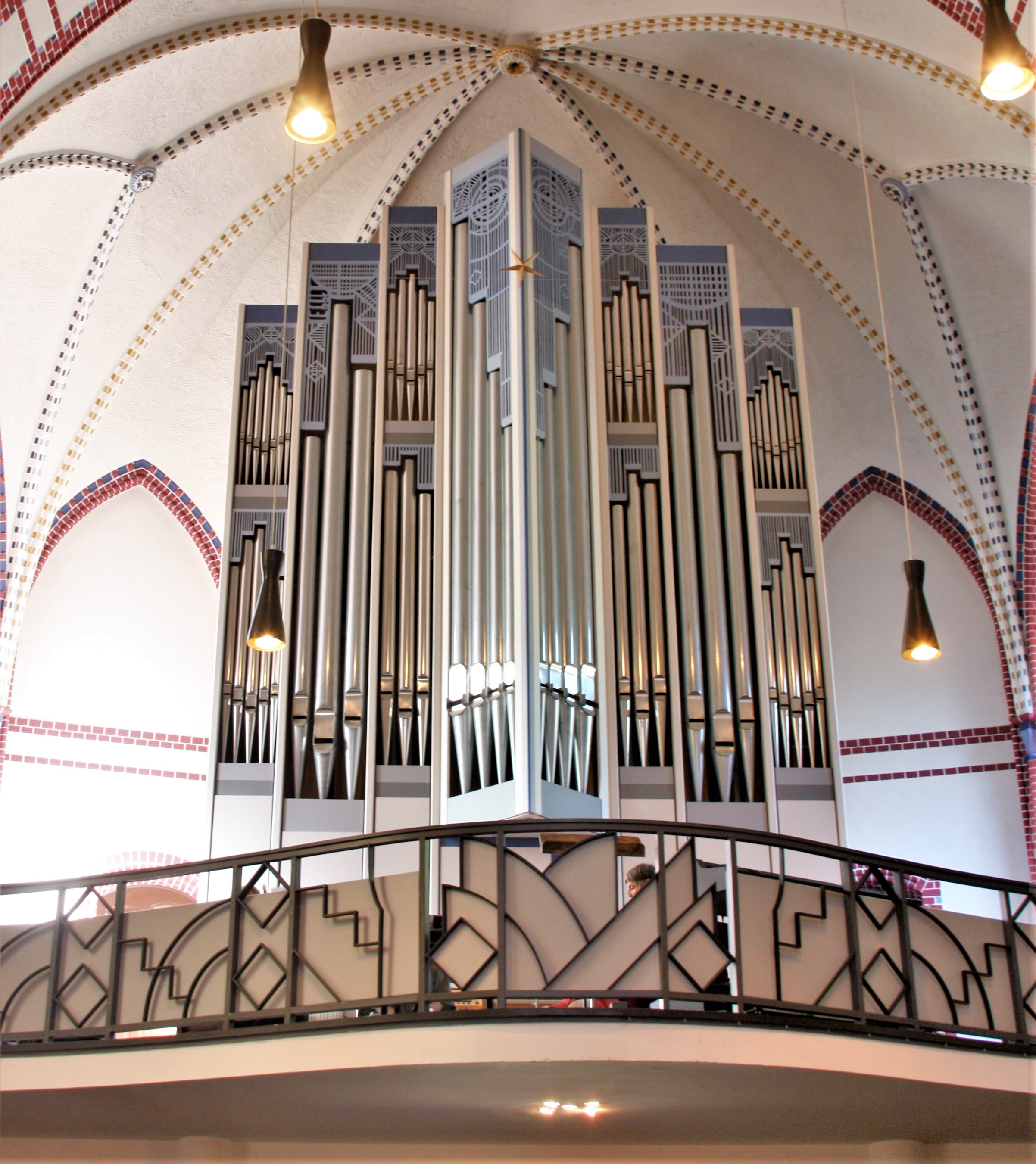 Hamburg, Ottensen, Kreuzkirche, Innenraum, Orgelprospekt, Lobback-Orgelbau, 1993